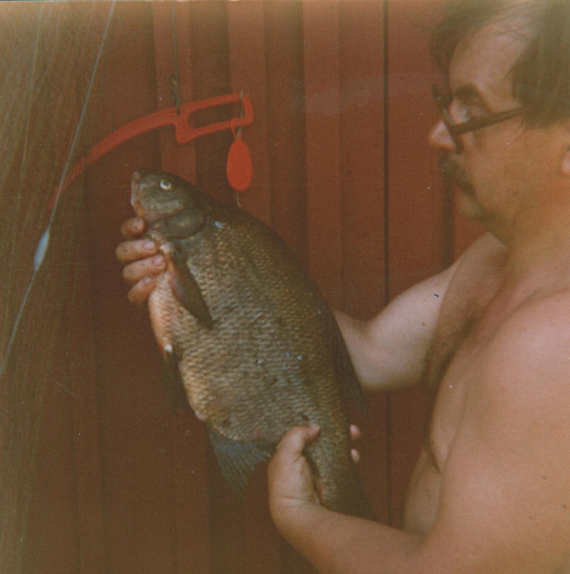 Sakke's fish